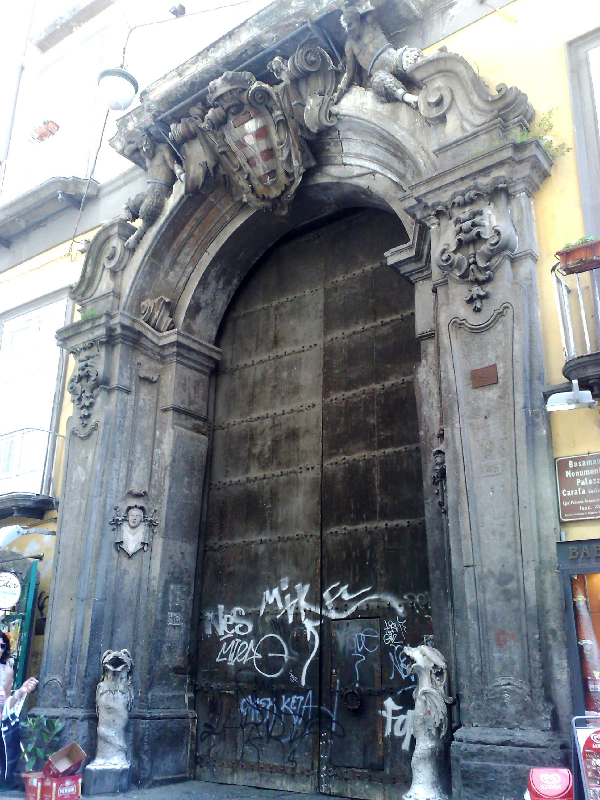 Palazzo Carafa della Spina (Napoli). Portone